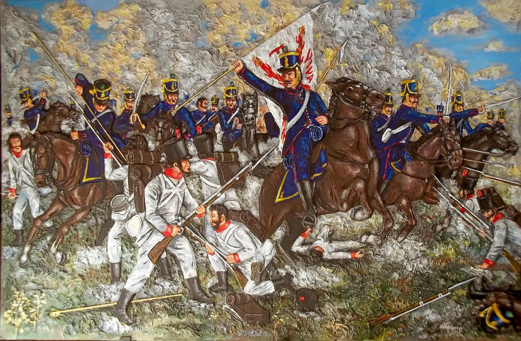 Pintura sobre relieve, 1,20 x 0,75 m., Acción del Combate de San Lorenzo, donde el Teniente Hipólito Bouchard captura la bandera realista. Autor: Alberto Nassivera